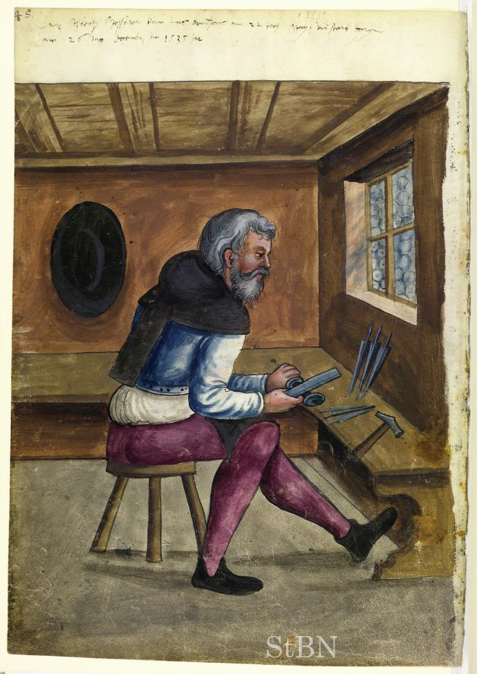 Transkription und weitere Informationen Contz (Kunz) Schleich, Messerer (Messerer; Messerschmied)